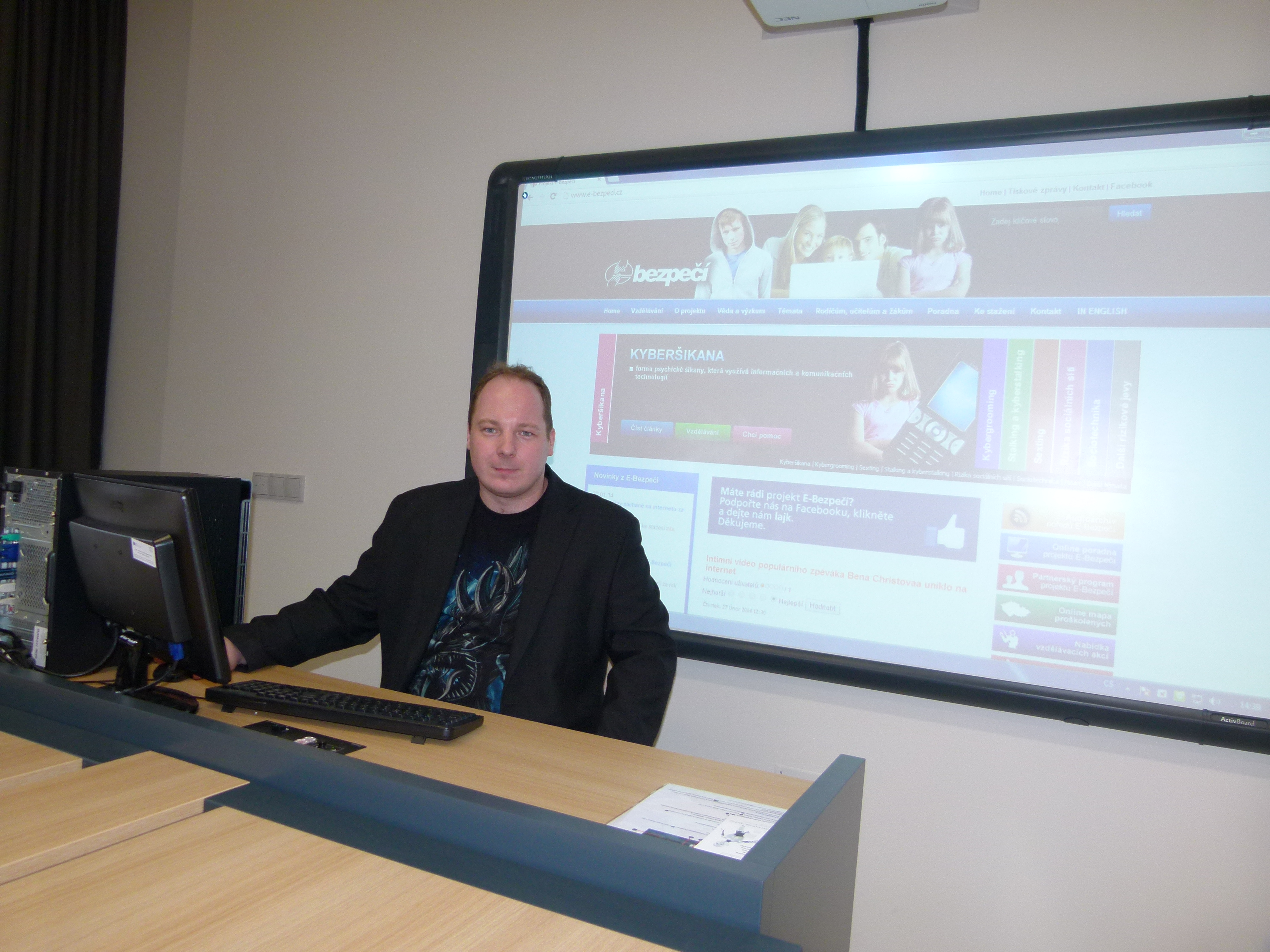 Kamil Kopecký